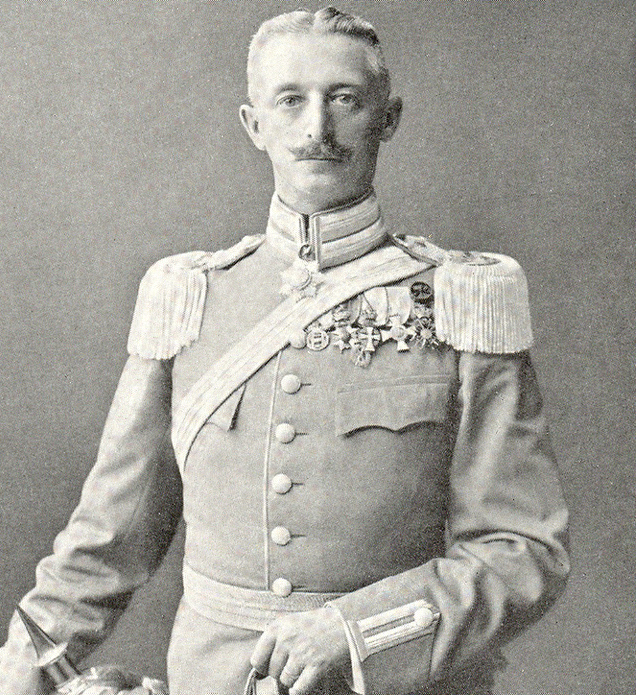 Gustaf Adolf Boltenstern